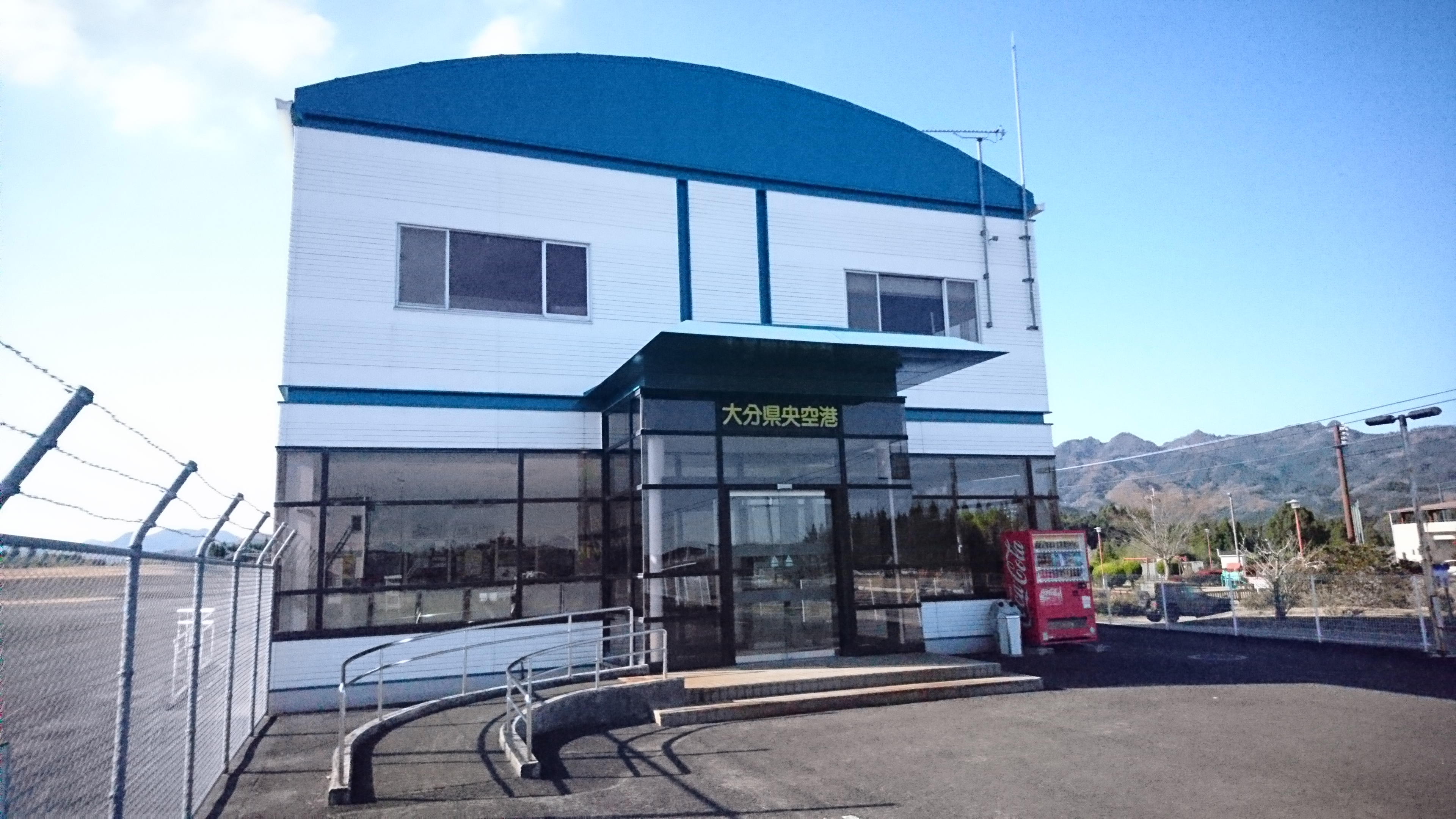 大分県央飛行場ターミナル